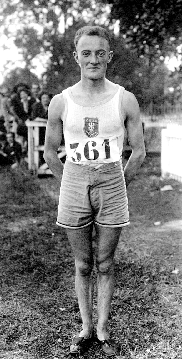 Colombes, championnat de France d'athlétisme : Brossard, gagnant du 800 m : [photographie de presse] / Agence Meurisse